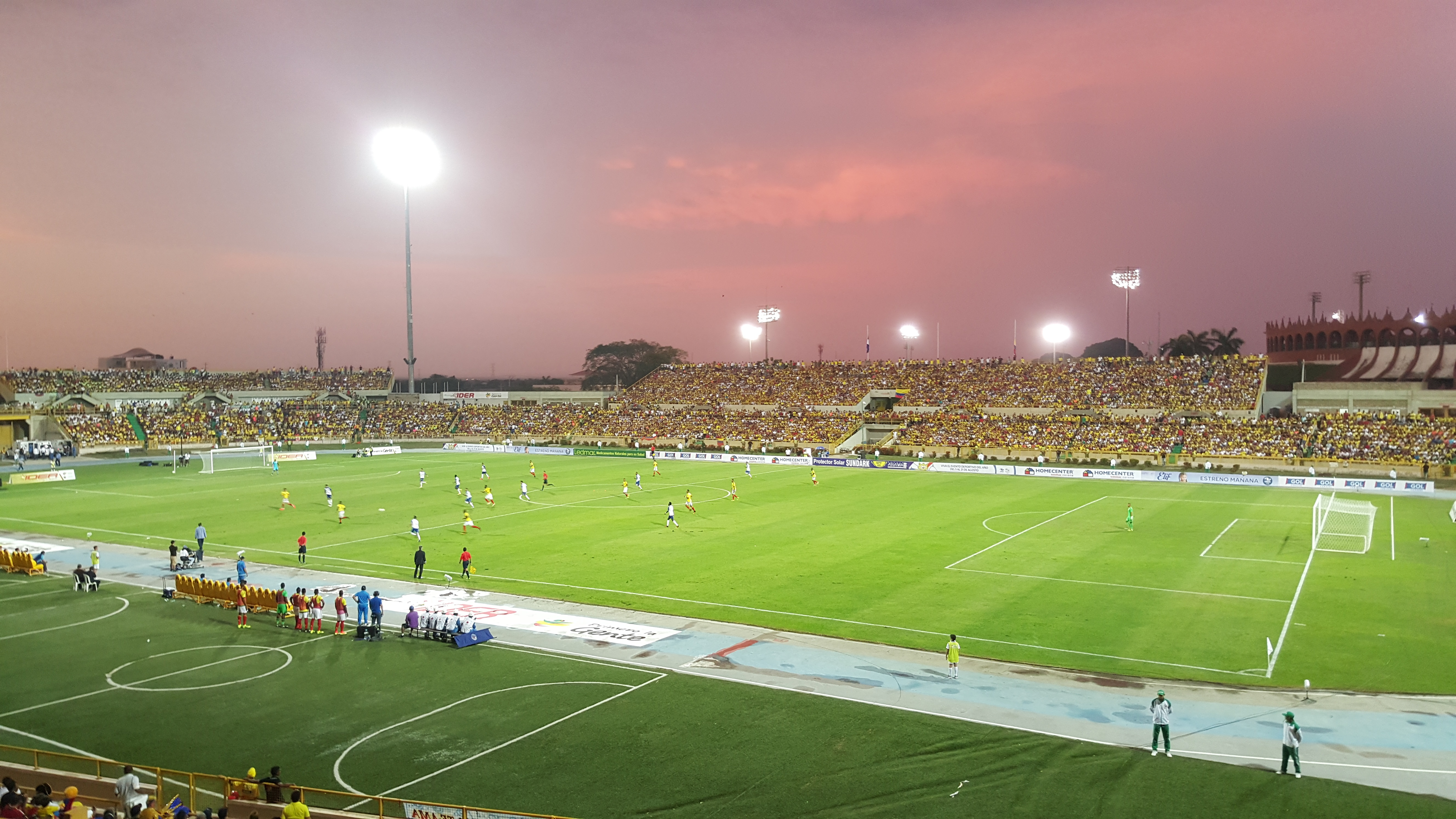 Estadio Jaime Morón